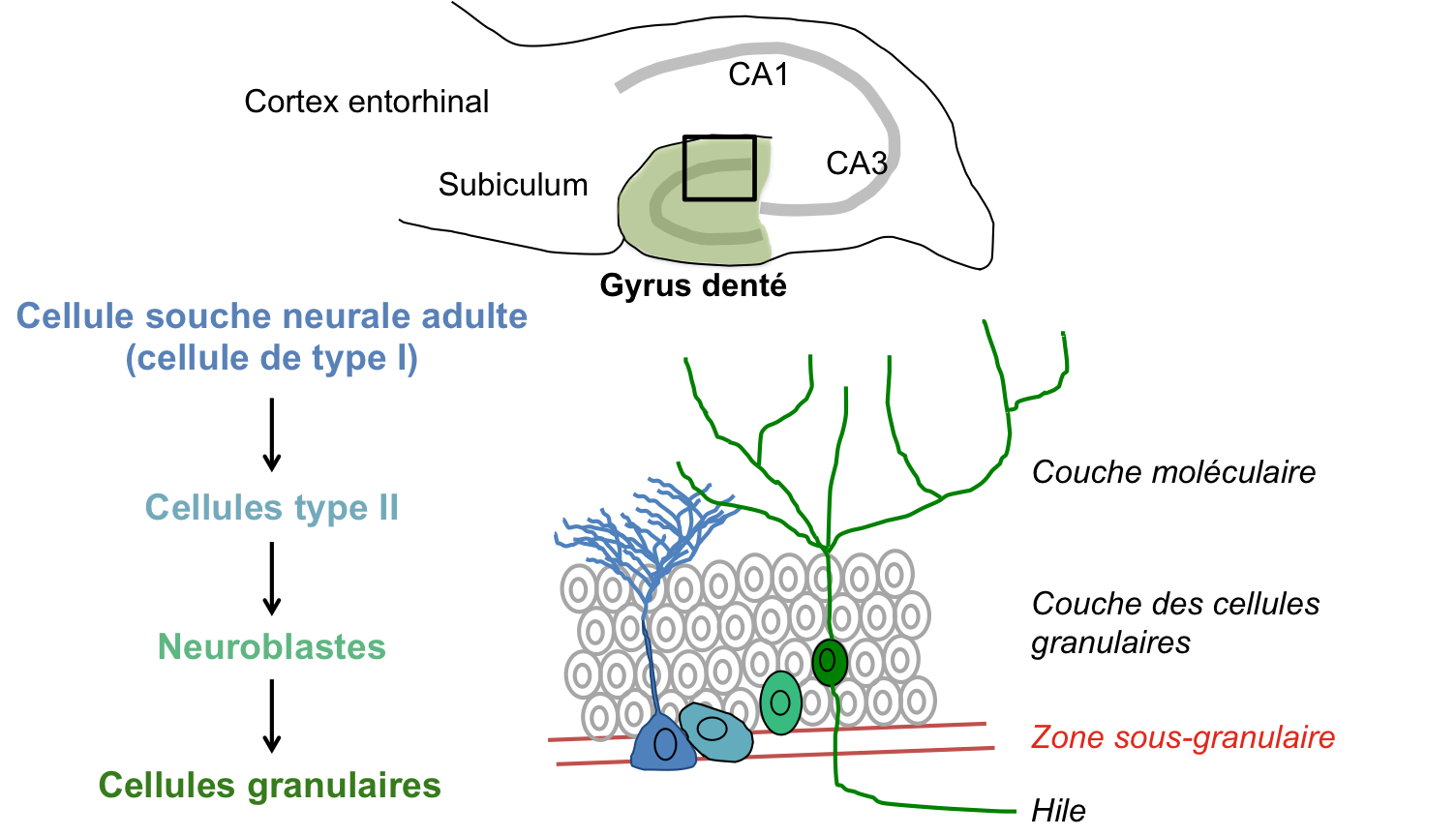 Haut : schéma d'une coupe d'un hippocampe avec en vert, le gyrus denté. Bas : étapes cellulaires de la neurogenèse et schéma de ces cellules dans les couches du gyrus denté.